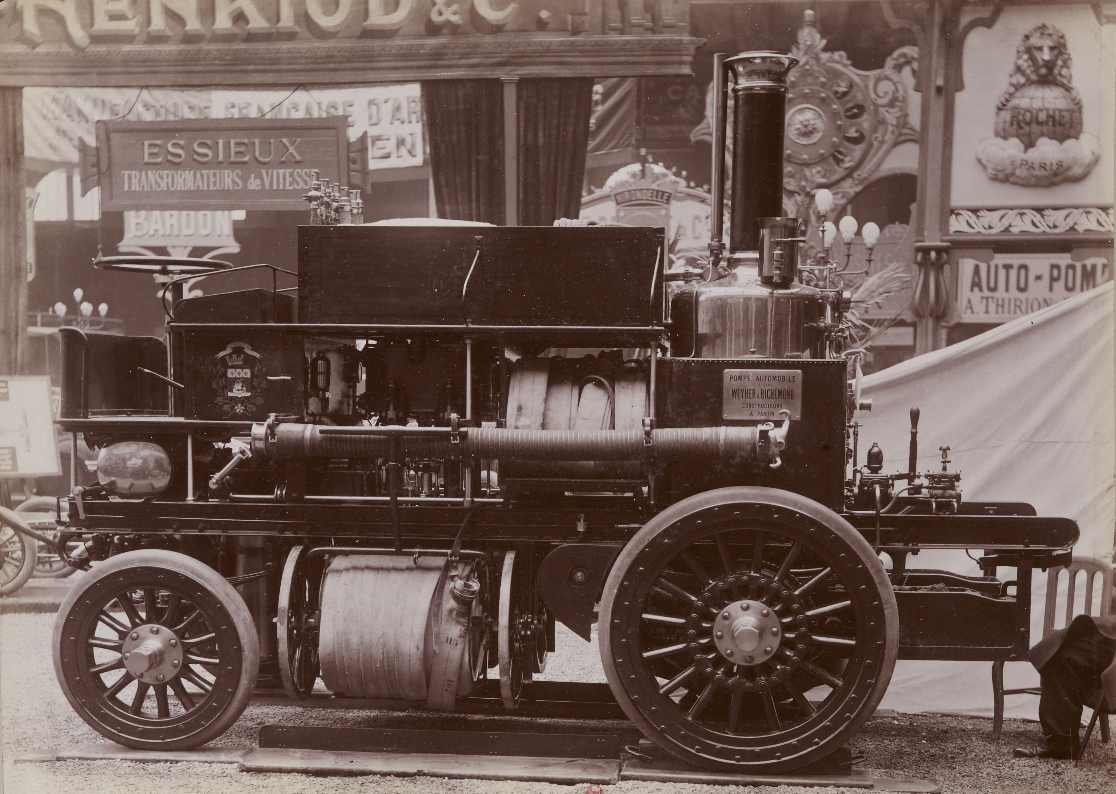 [Collection Jules Beau. Photographie sportive] : T. 24. Années 1903 et 1904 / Jules Beau : F. 35. [6e Salon, Grand-Palais, 10 - 25 décembre 1903];[6e Exposition Internationale de l’Automobile du Cycle et des Sports au Grand Palais du 10 au 25 décembre 1903, Automobile Club de France (ACF) - voir l'affiche.]